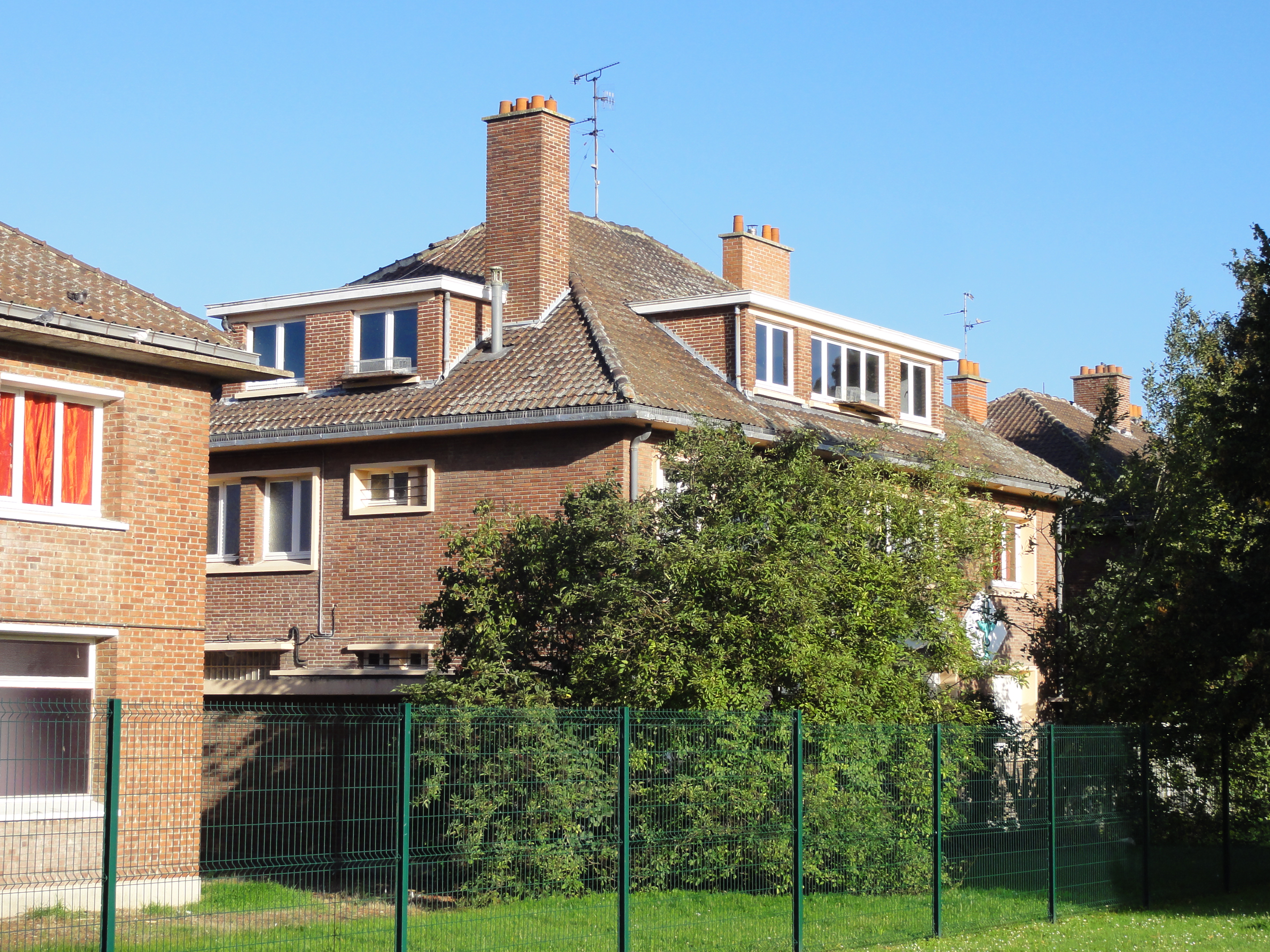 Pharmacie et centre médical des cités de la fosse Arenberg de la Compagnie des mines d'Anzin dans le bassin minier du Nord-Pas-de-Calais, Wallers, Nord, Nord-Pas-de-Calais, France.